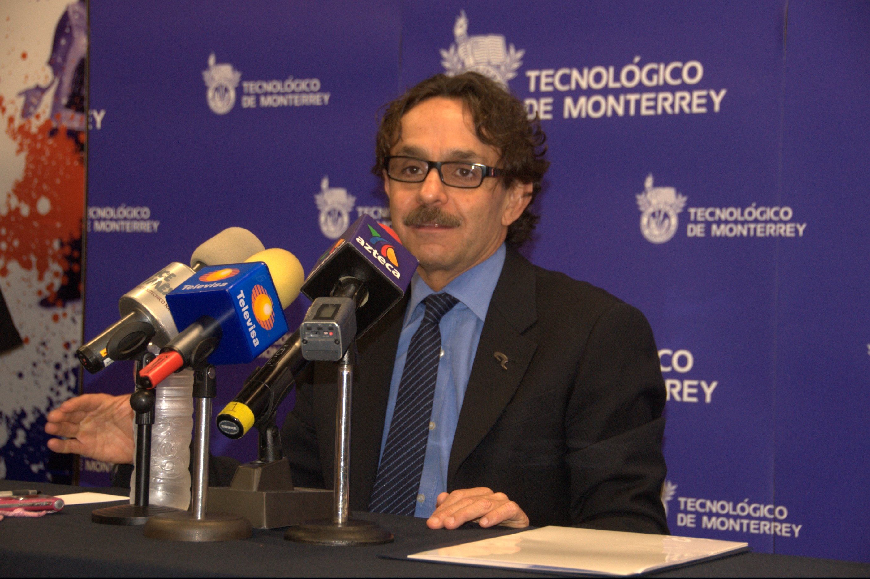 Candidato para presidente Gabriel Quadri en ITESM Campus Ciudad de México